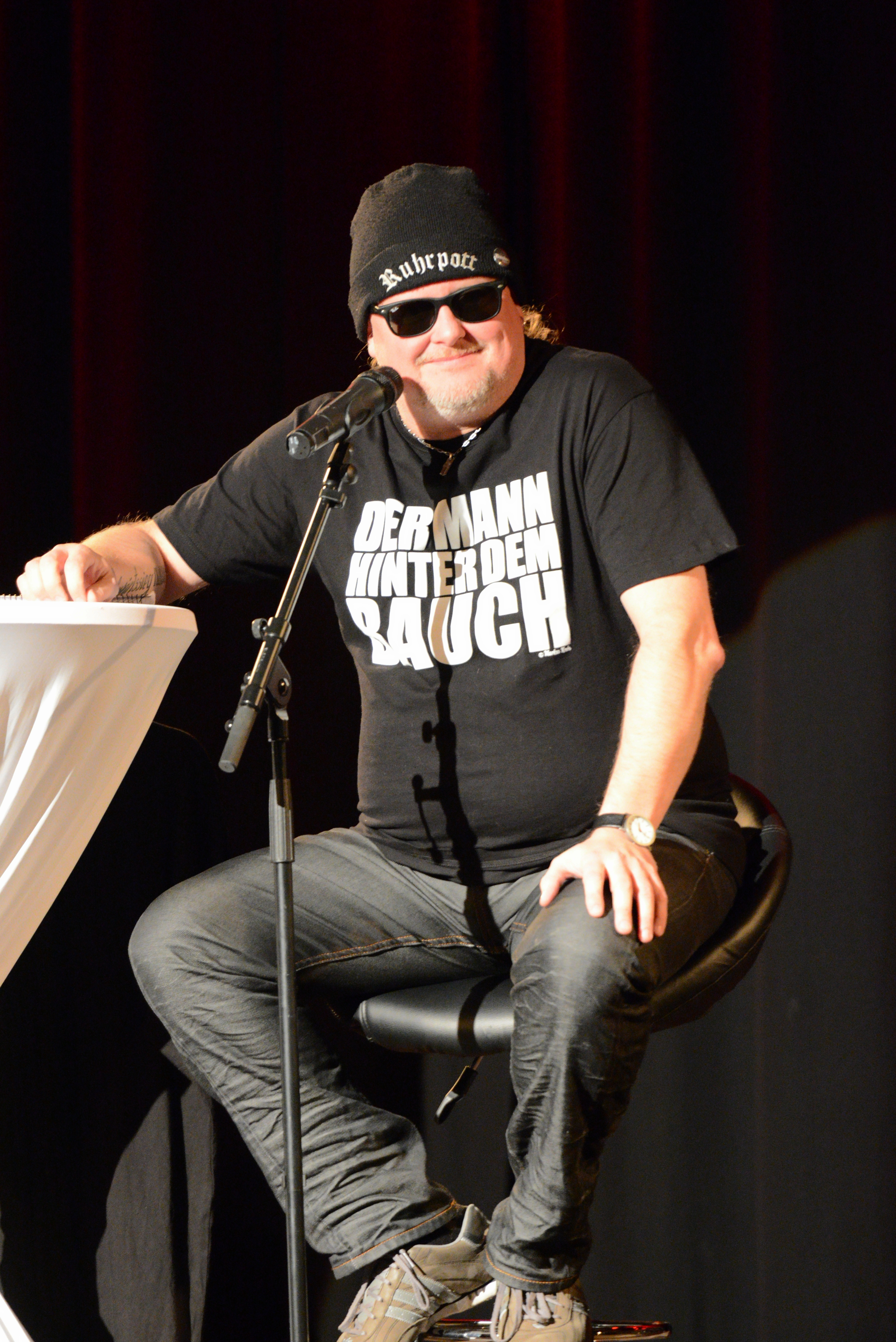 Markus Krebs bei einem Auftritt im Steinhof Duisburg 2013.